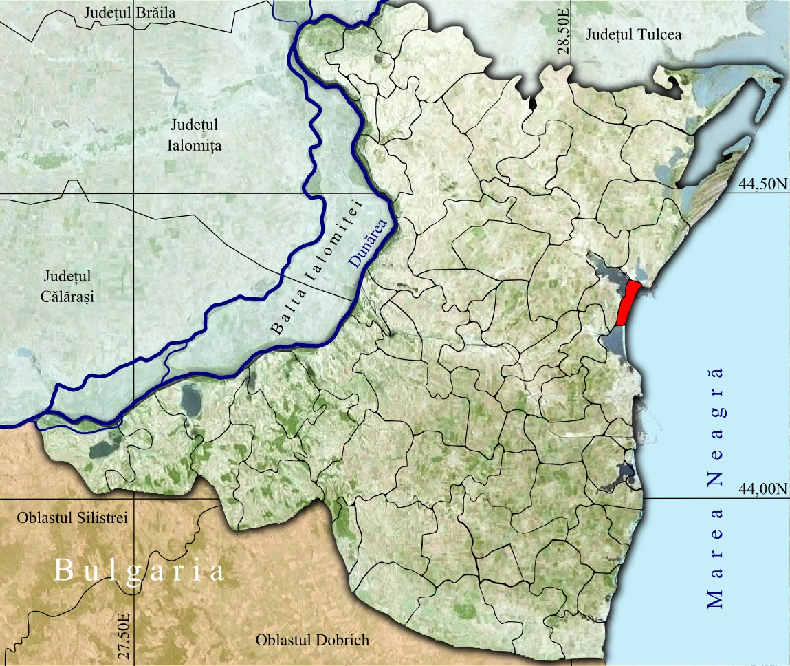 Navodari jud Constanta.jpg